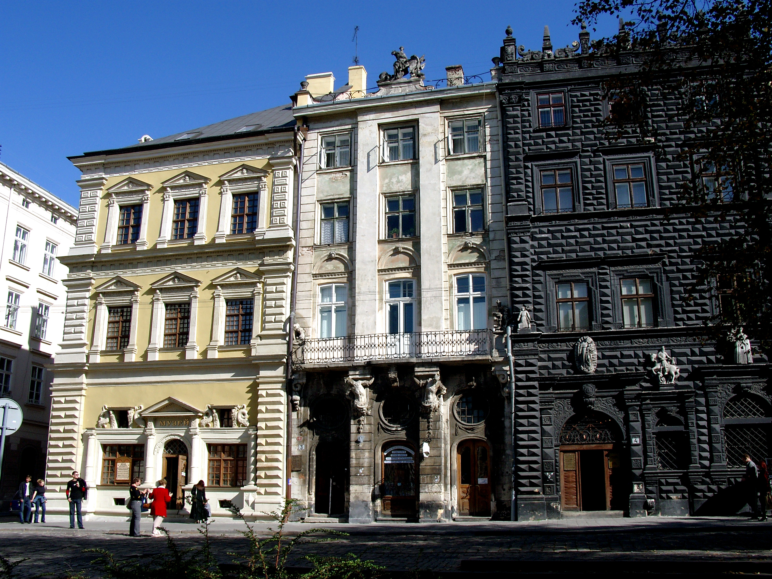 житловий будинок (Кам'яниця Бандінеллі) — будинок, в якому була організована регулярна пошта, Львів, Ринок пл., 2